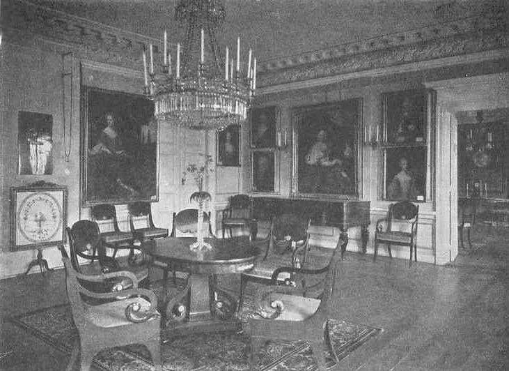 Salen på Tervik i Pernå, Finland.